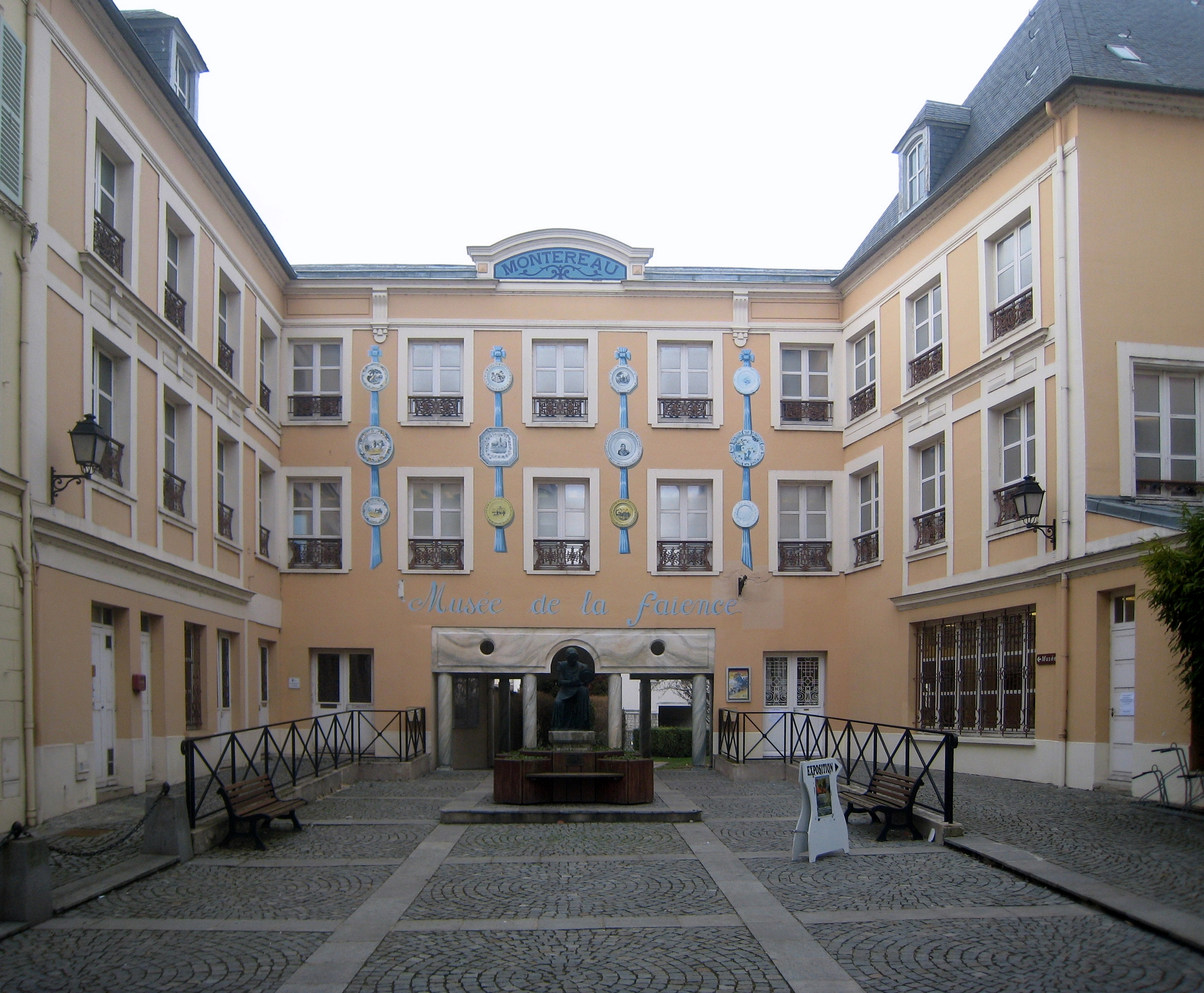 Le musée de la faîence à Montereau-fault-Yonne